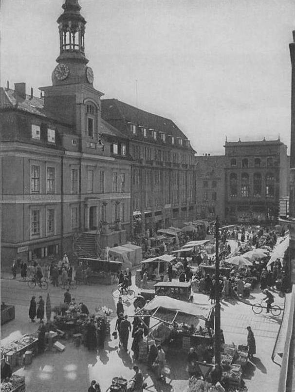 Der Altstädtische Markt mit Rathaus